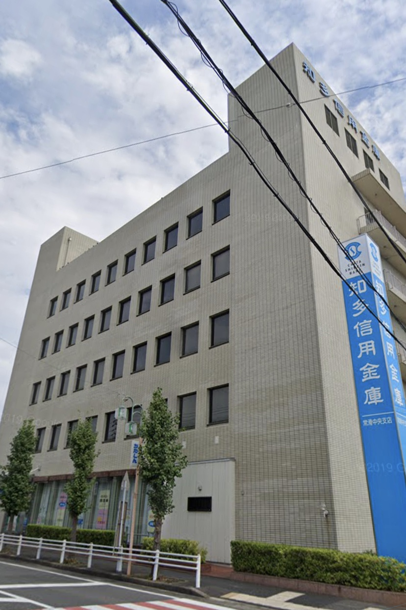 The Chita Shinkin Bank branch